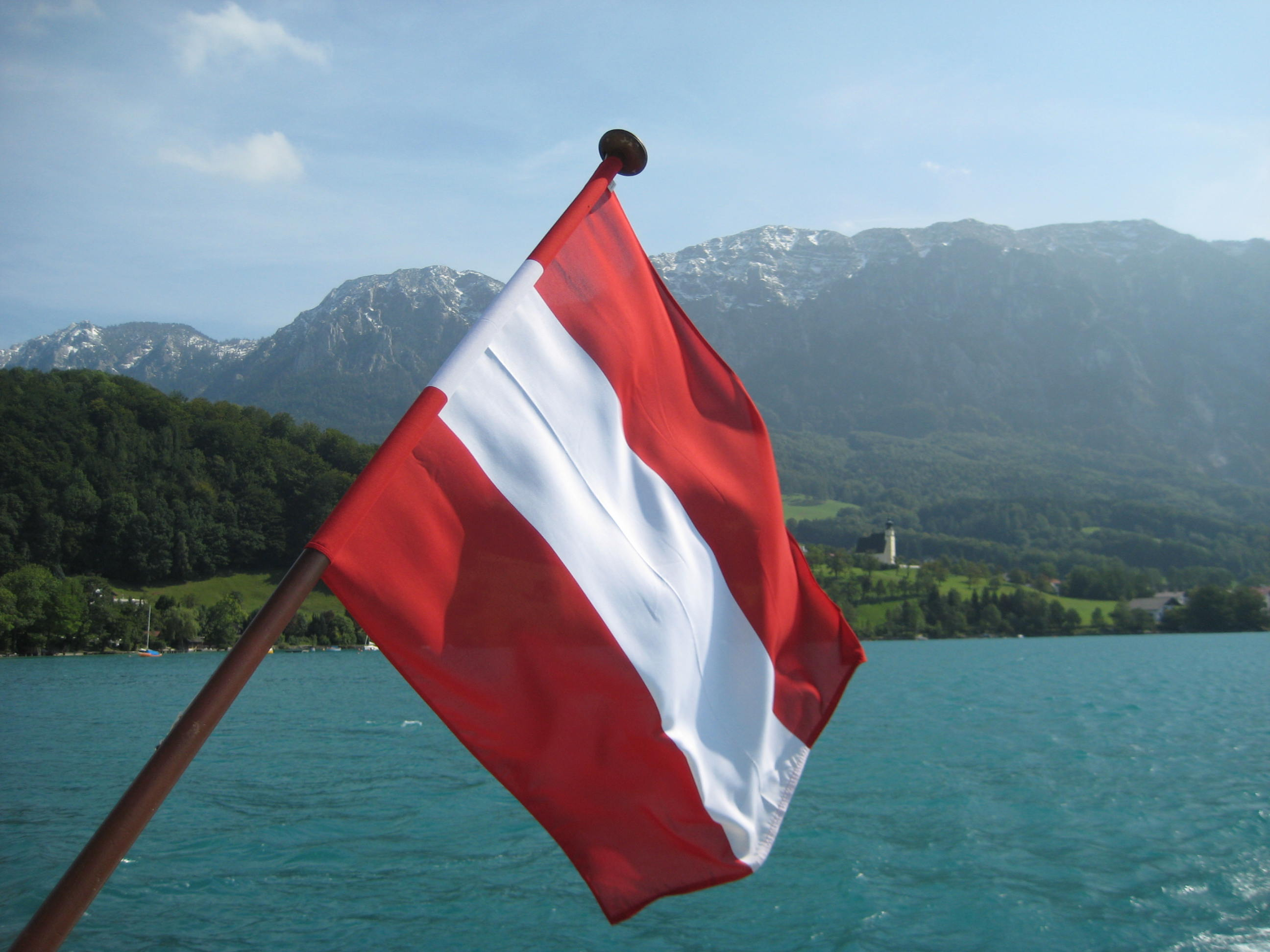 Seefahrt mit Berufsschiffahrt in Österreich; siehe auch Attersee-Schifffahrt